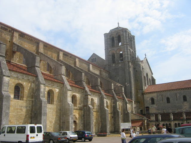 Abbatiale de Vézelay, Bourgogne, France